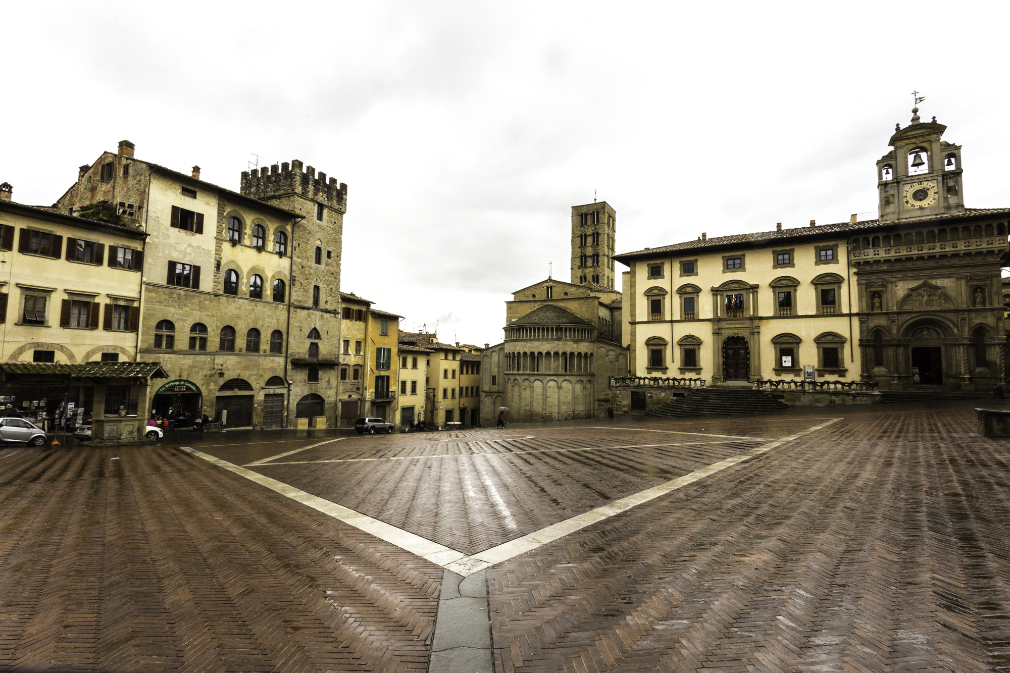 Tipica pavimentazione rossa